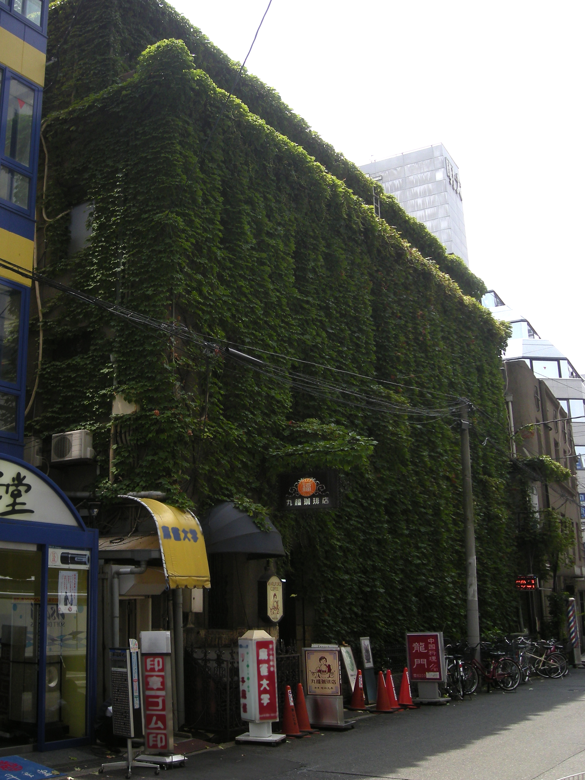 青山ビル（大阪市中央区伏見町）